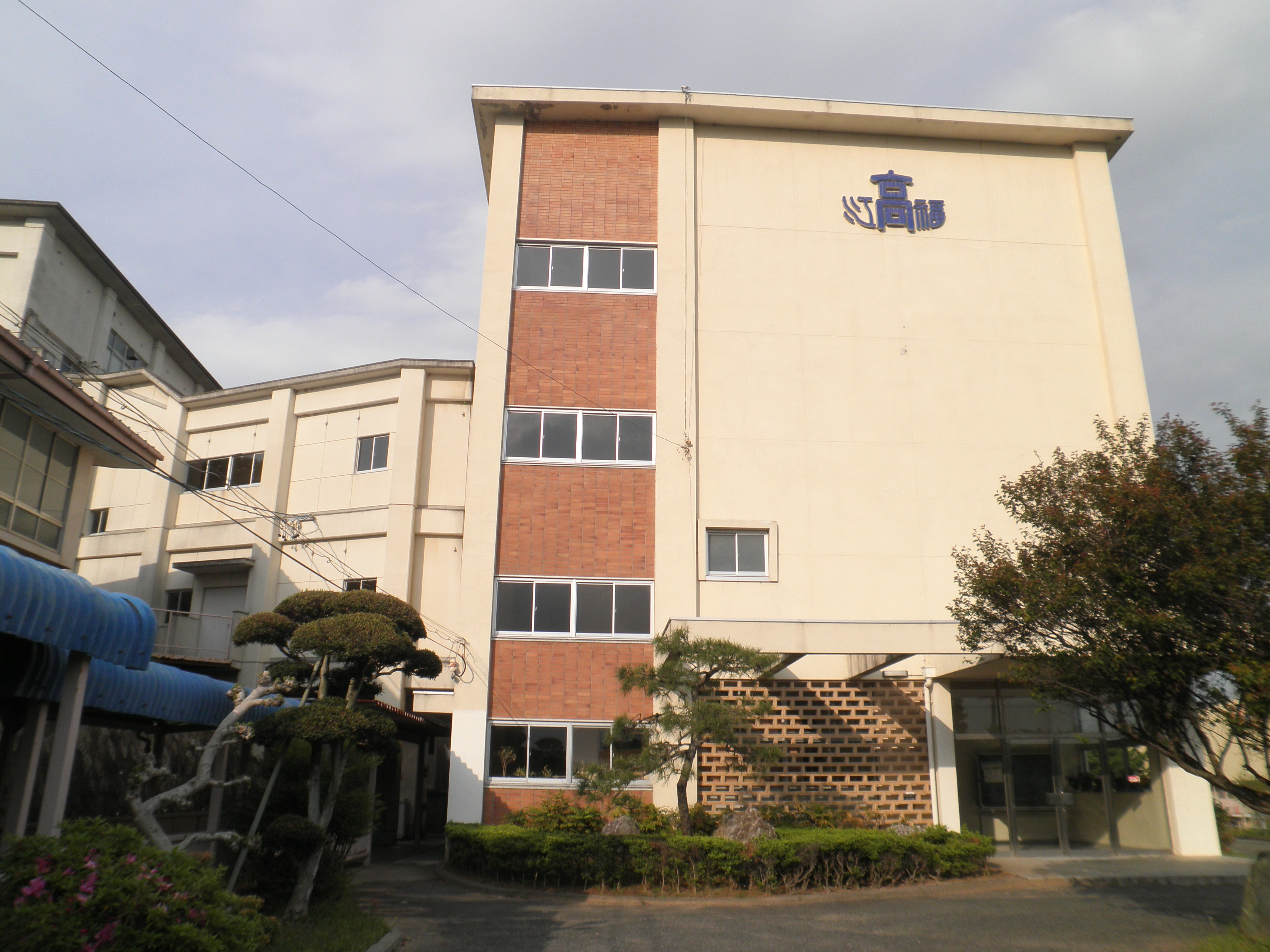 愛知県田原市にある県立福江高校